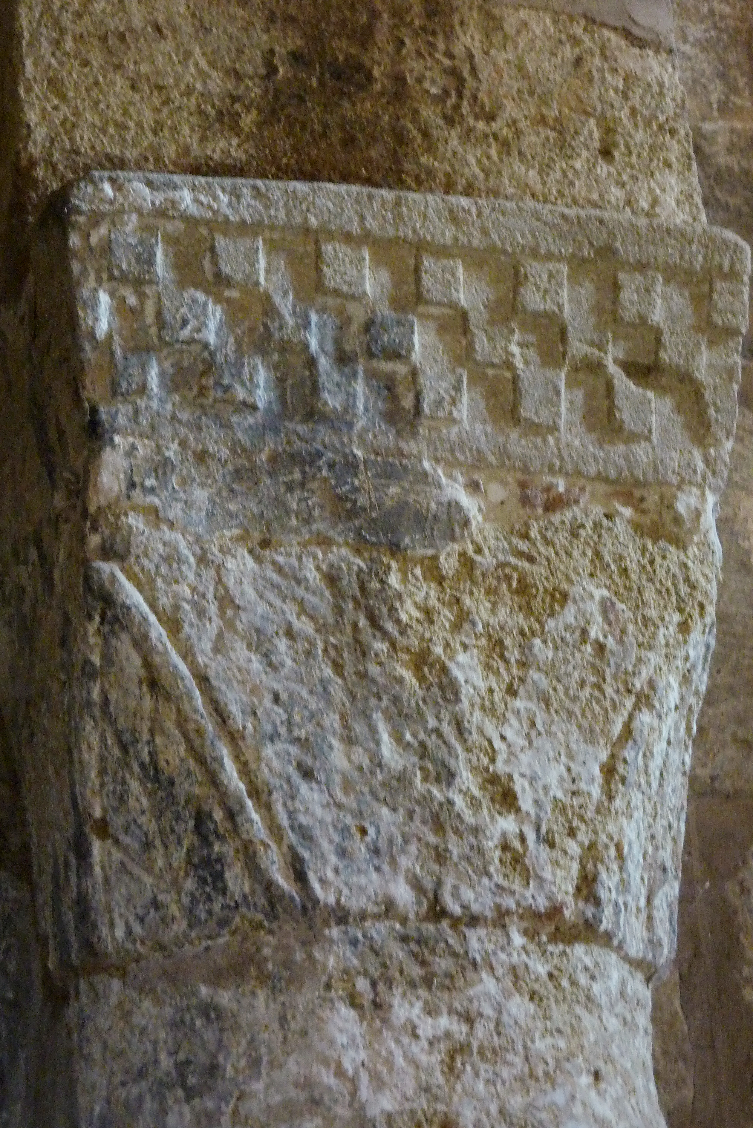 Romanische Kapelle Sainte-Madeleine in Bédoin, einer Gemeinde im Département Vaucluse in der französischen Region Provence-Alpes-Côte d’Azur, Kapitell mit Schachbrettdekor